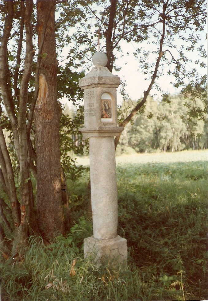 Boží muka, která do 90.let stávala při silnici do Třeště na Smolínově parcele Studnice (Telč). Boží muka nejsou na původním místě. Části božích muk, podstavec a kruhový dřík je uložen na nádvoří MÚ v Telči. Bylo tak zabráněno jejich úplnému zizení. Kaplice bohužel zcizena byla.